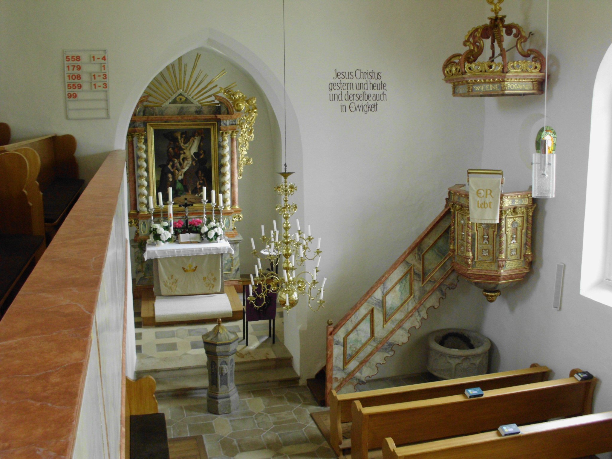 Trommetsheim, Gemeinde Alesheim im Landkreis Weißenburg-Gunzenhausen (Bayern), evang.-luth. Pfarrkirche St. Emmeram, Kircheninneres gegen Osten